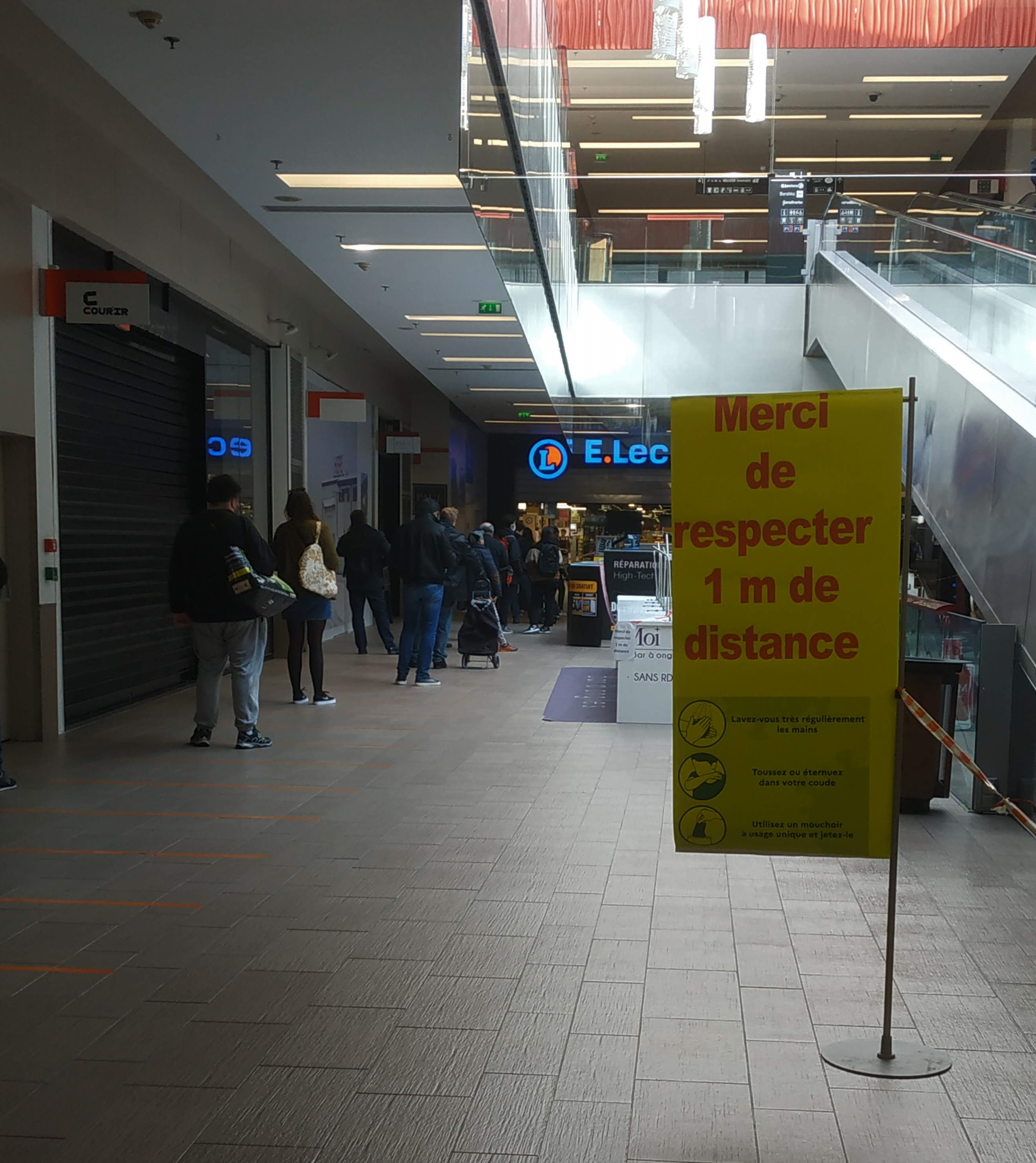 Dans le cadre du confinement de mars 2020, les courses de première nécessité sont autorisées mais avec des mesures de distanciation sociale, ici pour accéder à l'hypermarché Leclerc Rivetoile à Strasbourg